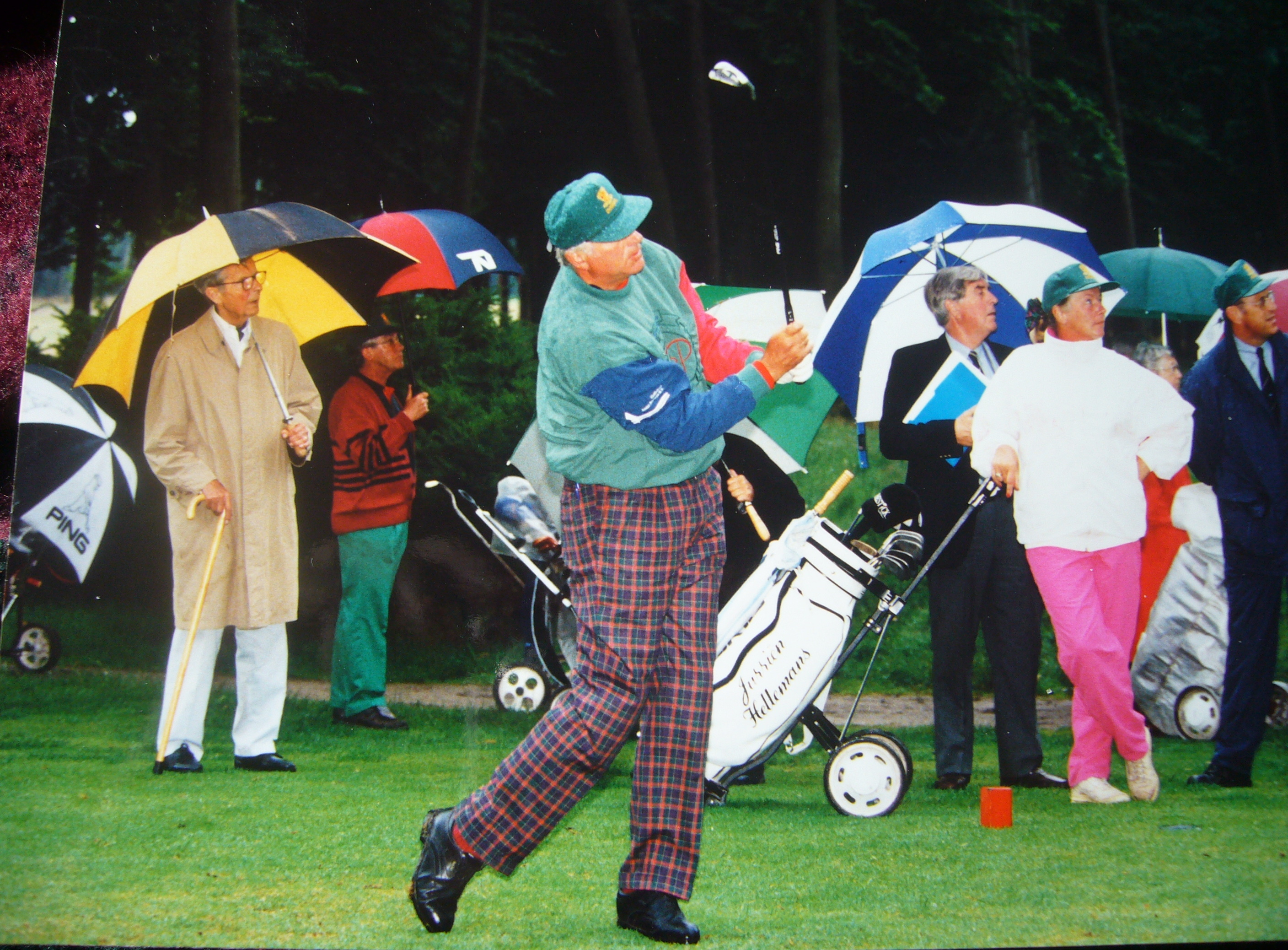 Jurrien Hellemans, Nederlands golfprofessional